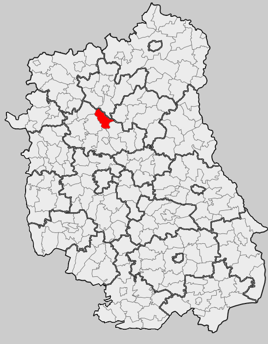 Map of gmina Ostrówek, Lubartów county, Lublin voivodship Mapa gminy Ostrówek, powiat lubartowski, województwo lubelskie